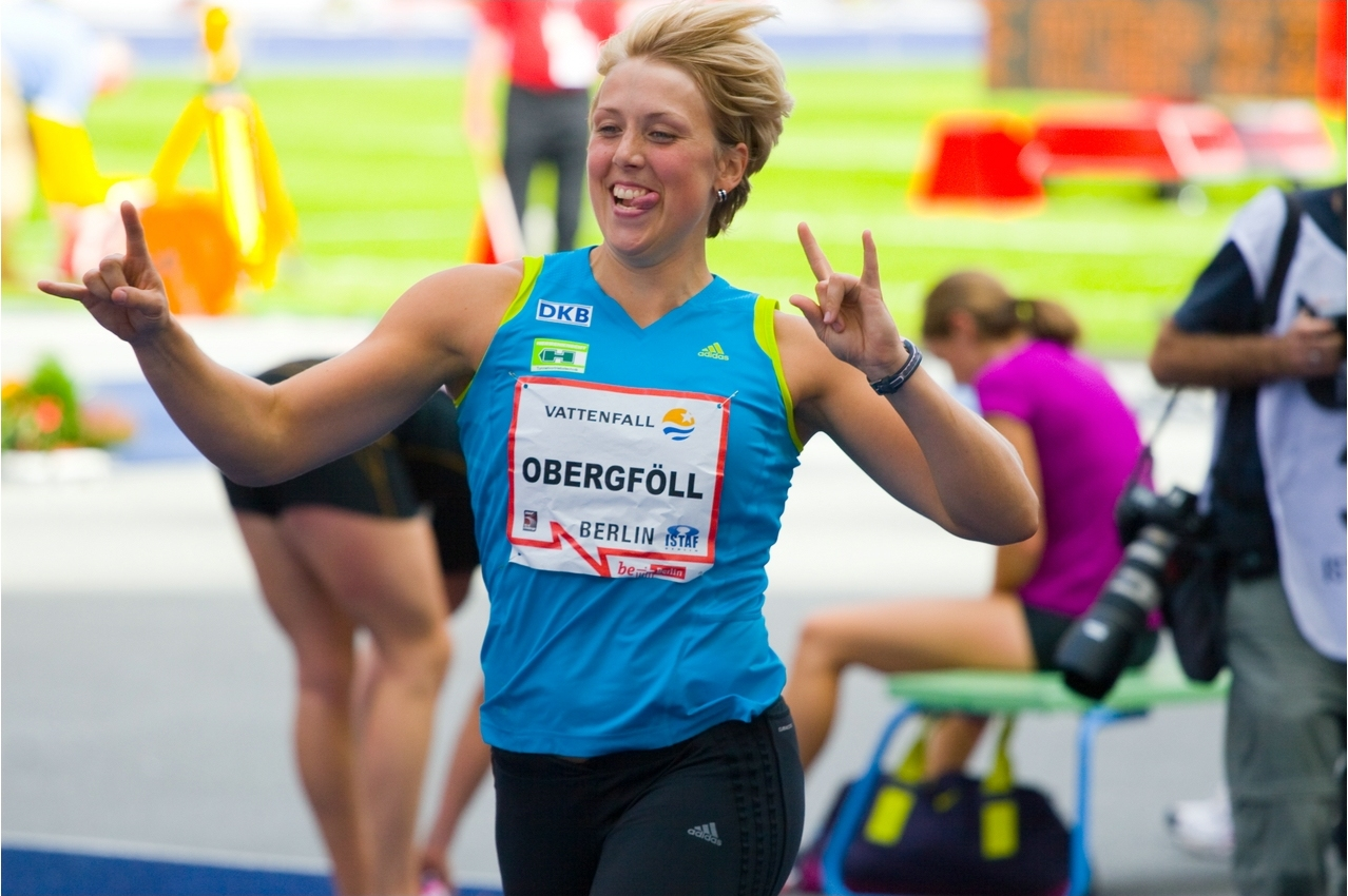 Christina Obergföll nach ihrem Siegwurf über 67,57m